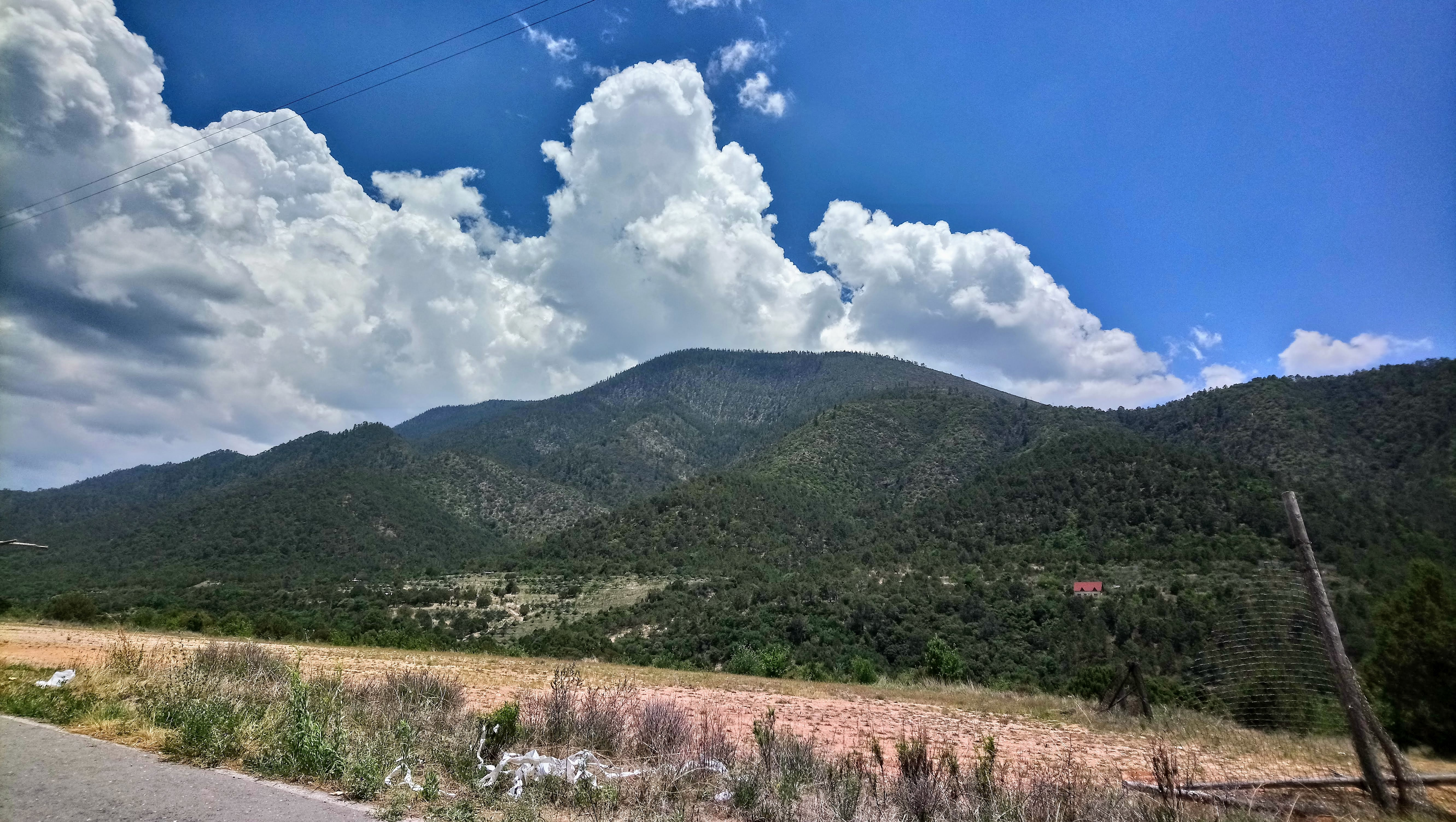 Cerro Rancho Nuevo en Arteaga, Coahuila